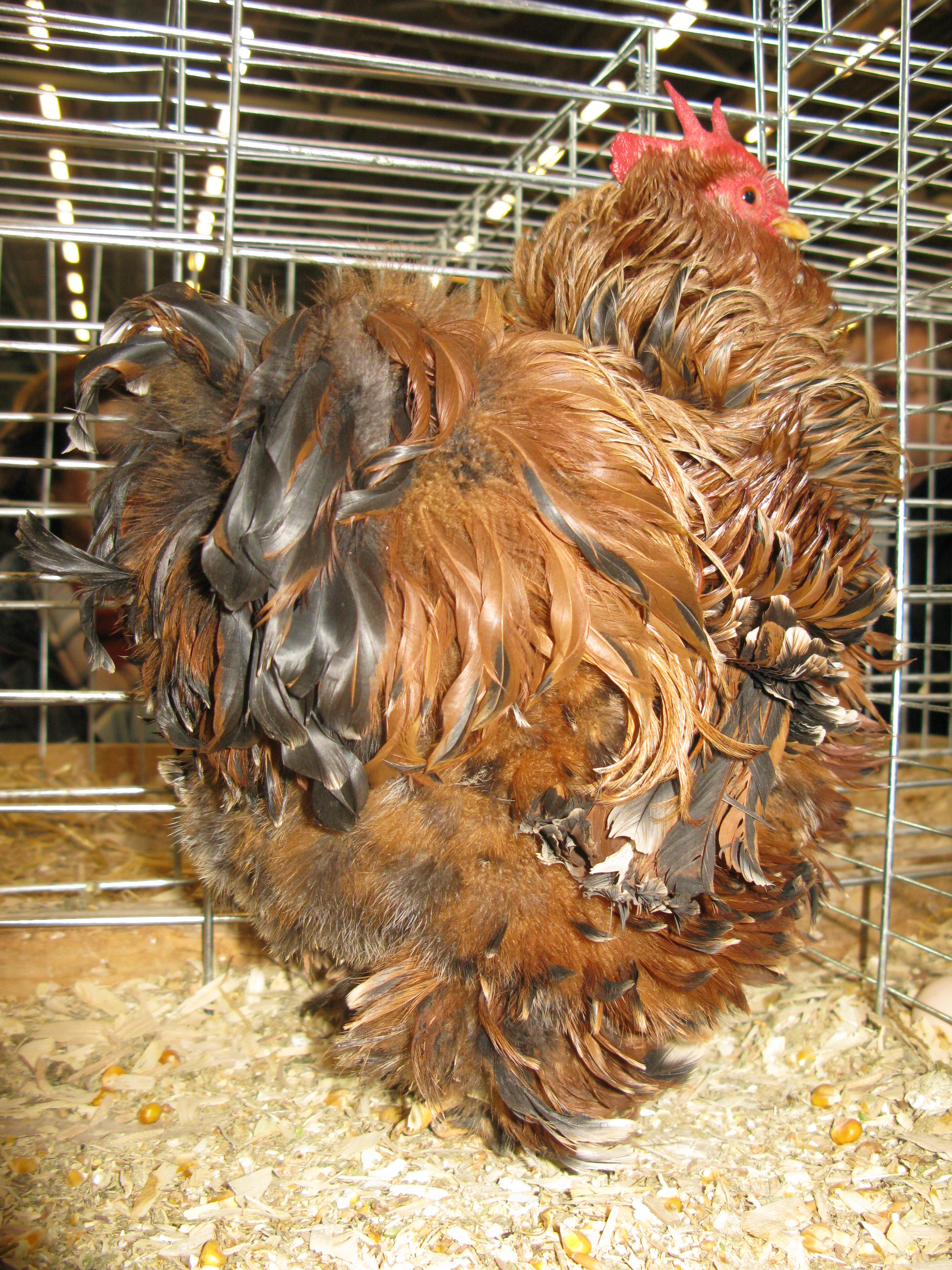 Un coq frisé (gallus gallus domesticus), au salon de l'agriculture de Paris.